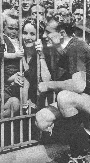 Valentino Mazzola e la prima moglie Emilia Ranaldi, con il primogenito Sandro, all'Arena Civica. Licensing Categoria:Immagini di Valentino Mazzola Categoria:Immagini di Sandro Mazzola